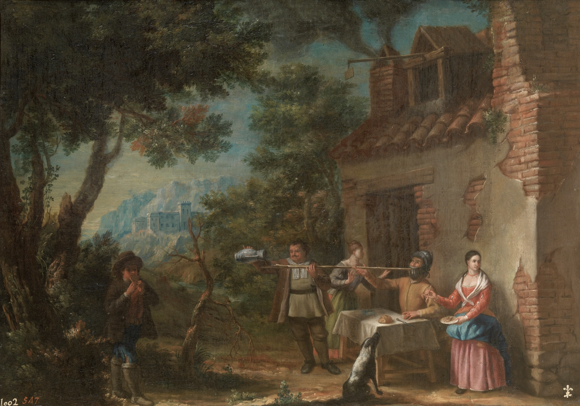 La obra representa una escena de la obra Don Quijote de la Mancha, que fue escrita por Miguel de Cervantes Saavedra en 1605.